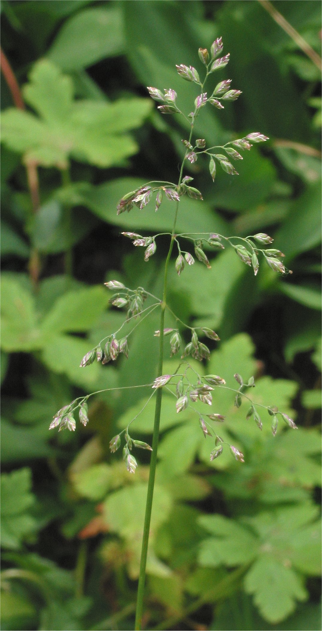 (Veldbeemdgras bloeiwijze) Poa pratensis